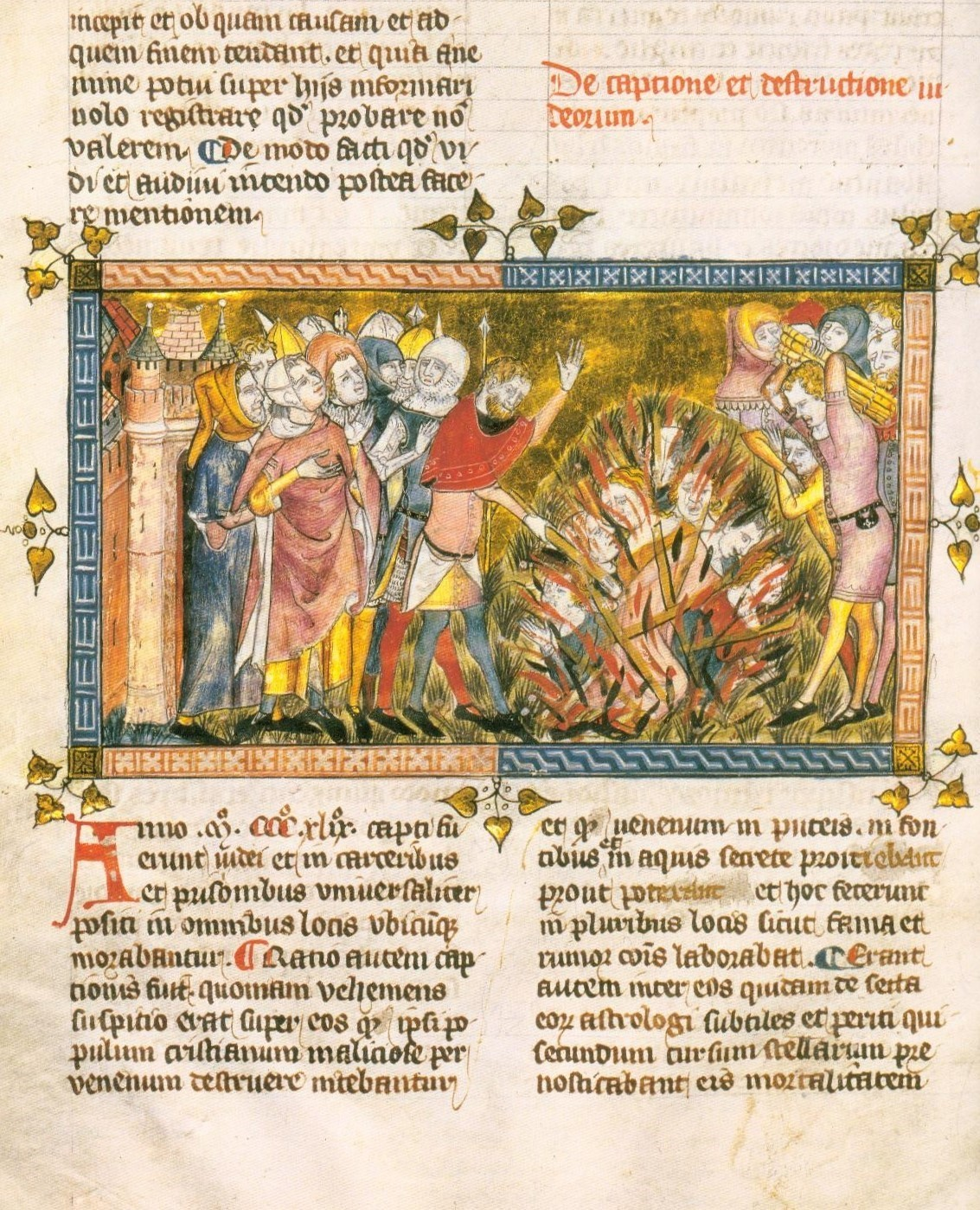 Hinrichtung von Juden, um 1350, Chronik von Gilles Li Muisis, MS 13076-77, fol. 12v Bibliothèque Royale de Belgique, Brüssel.